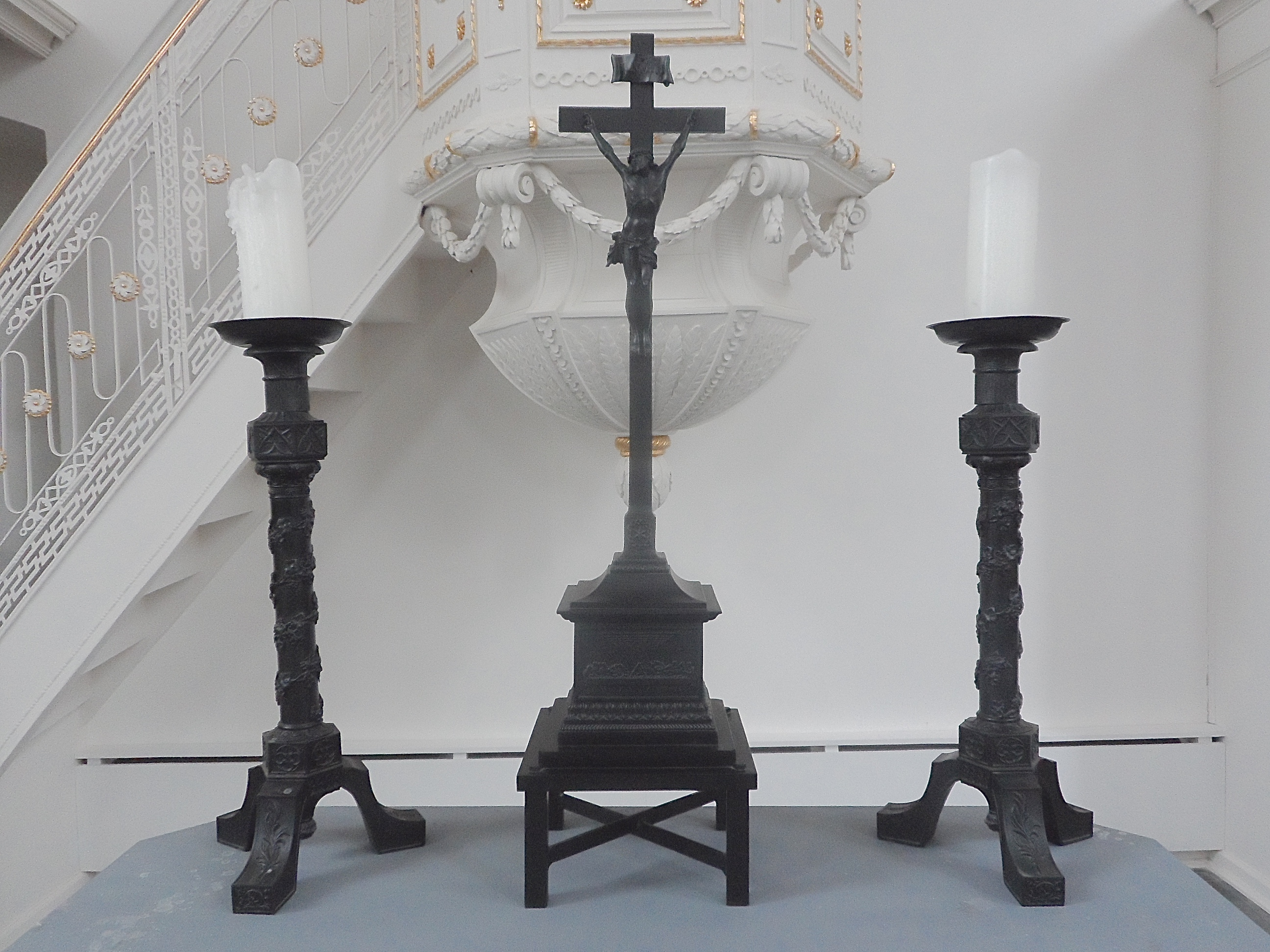 Kruzifix und Leuchter von 1821; Sayner Hütte